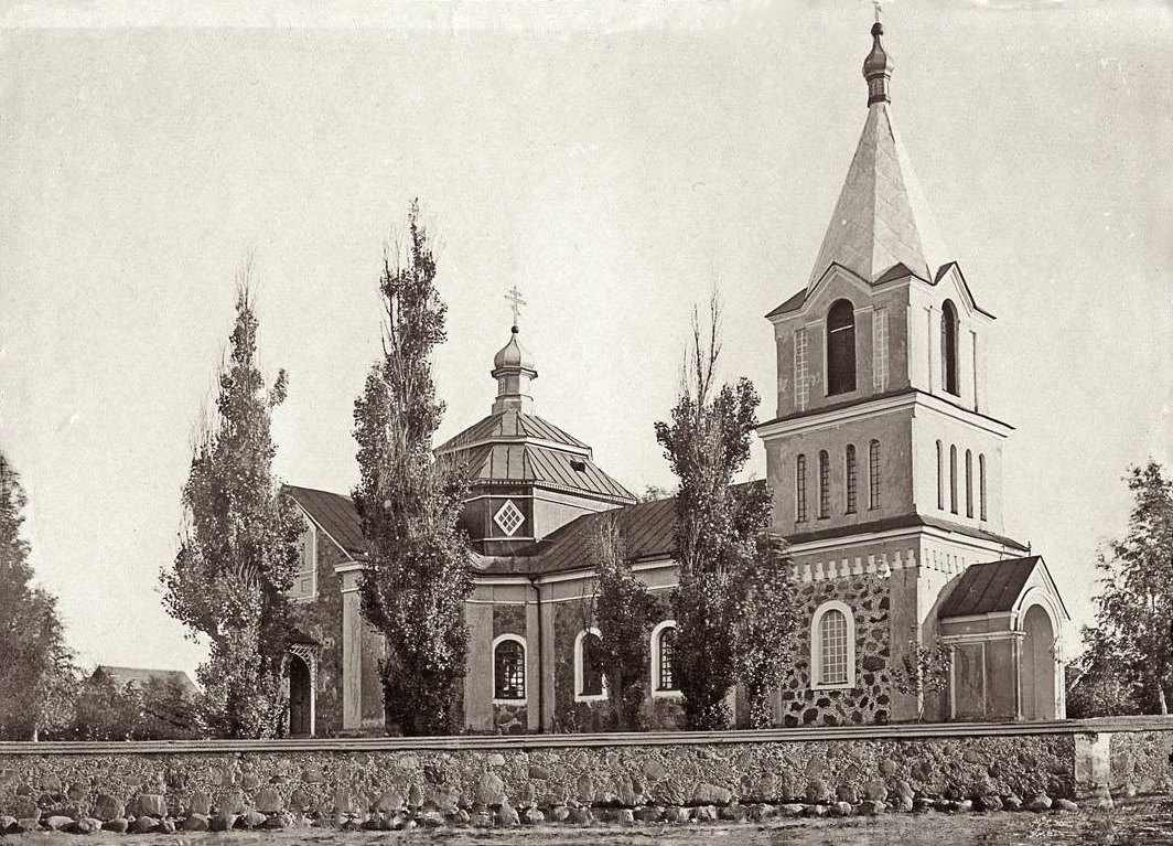 Беларуская (тарашкевіца): Астрына (Astryna). Царква-мураўёўка